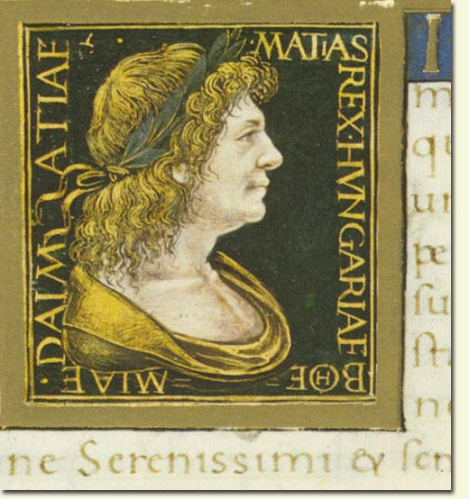 Mátyás, Magyarország, Csehország és Dalmácia uralkodója. Portré a Marlianus Mediolanensis-corvinában. Volterra, Biblioteca Guarnacci, Cod. Lat. 5518.IV.49.3.7.